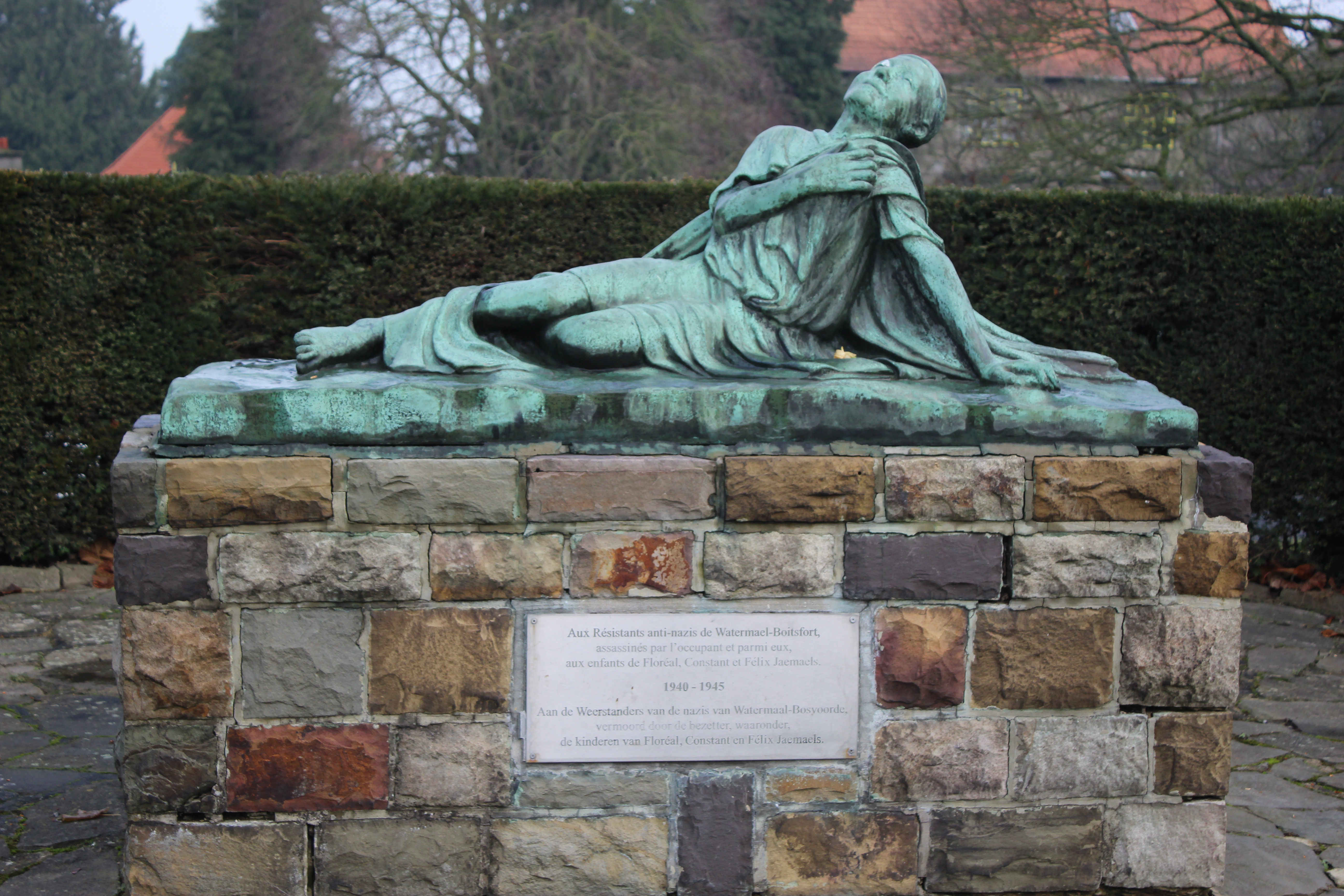 En Bruselas, Bélgica. Estatua de bronce por Arthur Craco.